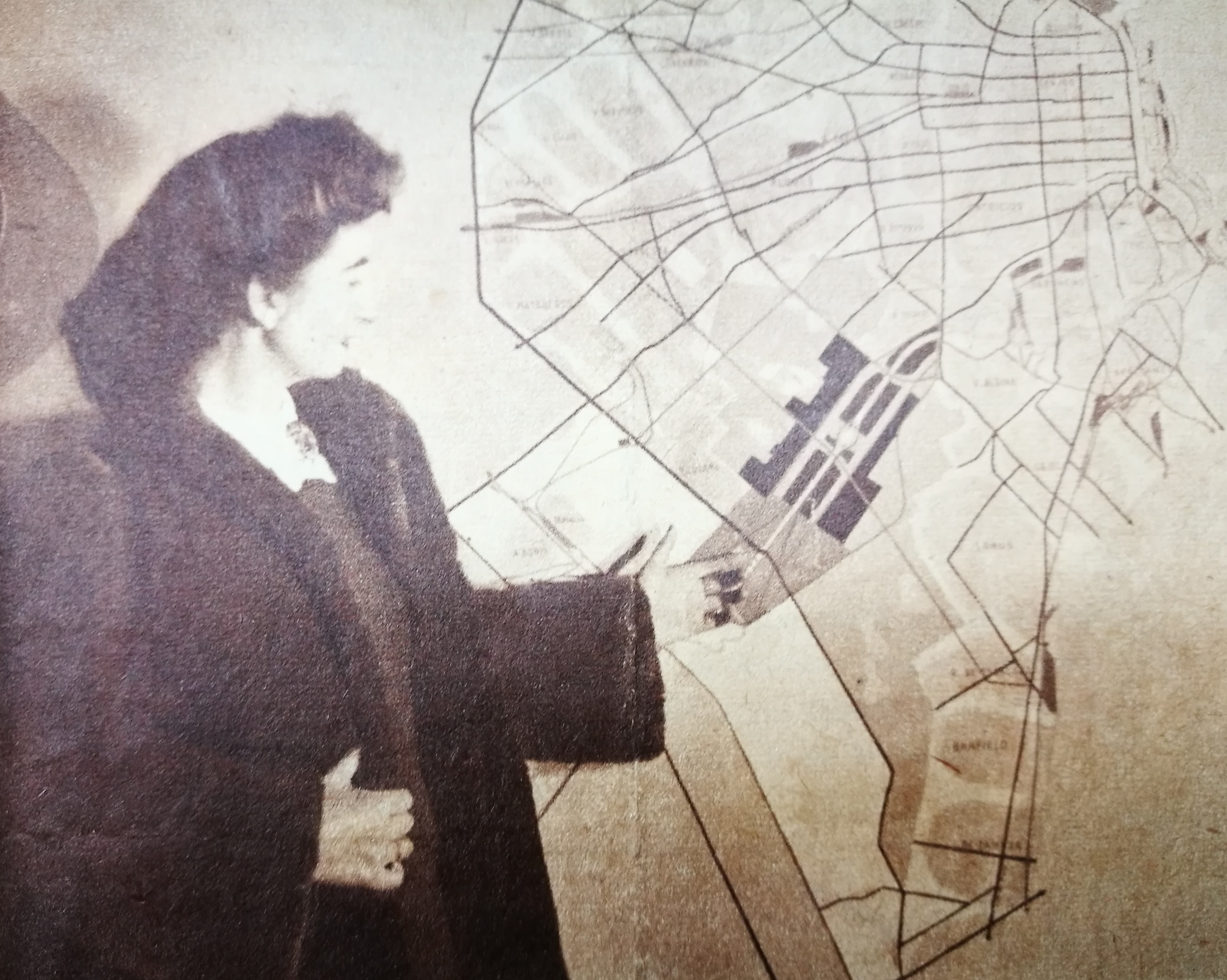 Itala Fulvia Villa, presentando el Proyecto para el Bajo Flores, Buenos Aires, realizado junto a Horacio Nazar, 1945